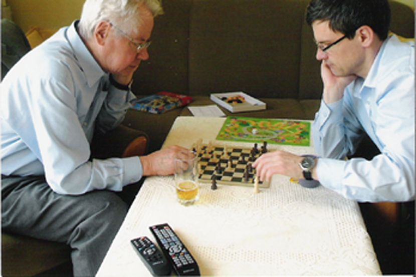 J. Such rozgrywa partię szachów ze swoim synem Januszem, informatykiem z zawodu. Szachy, to jego ulubiona rozrywka.